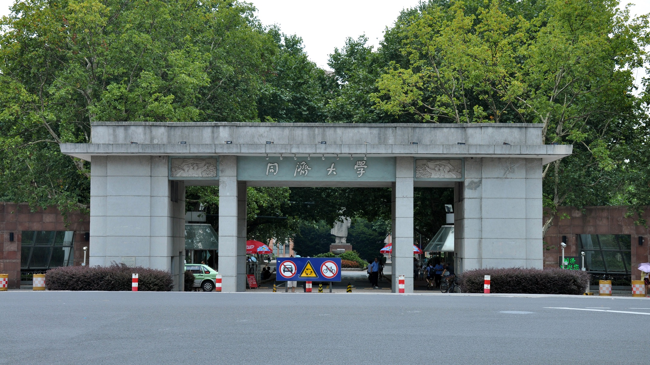 同济大学老校门 四平路1239号